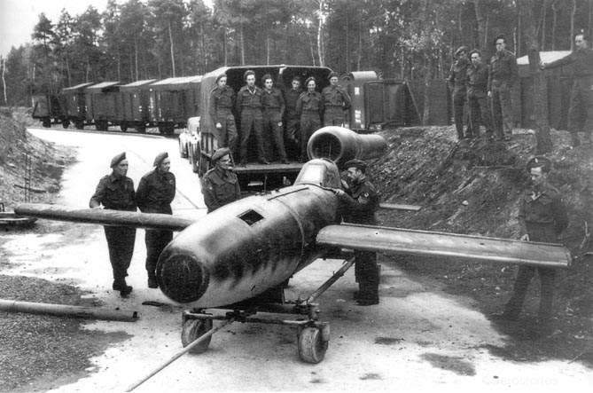 Von Engländern erbeutete "Reichenberg"